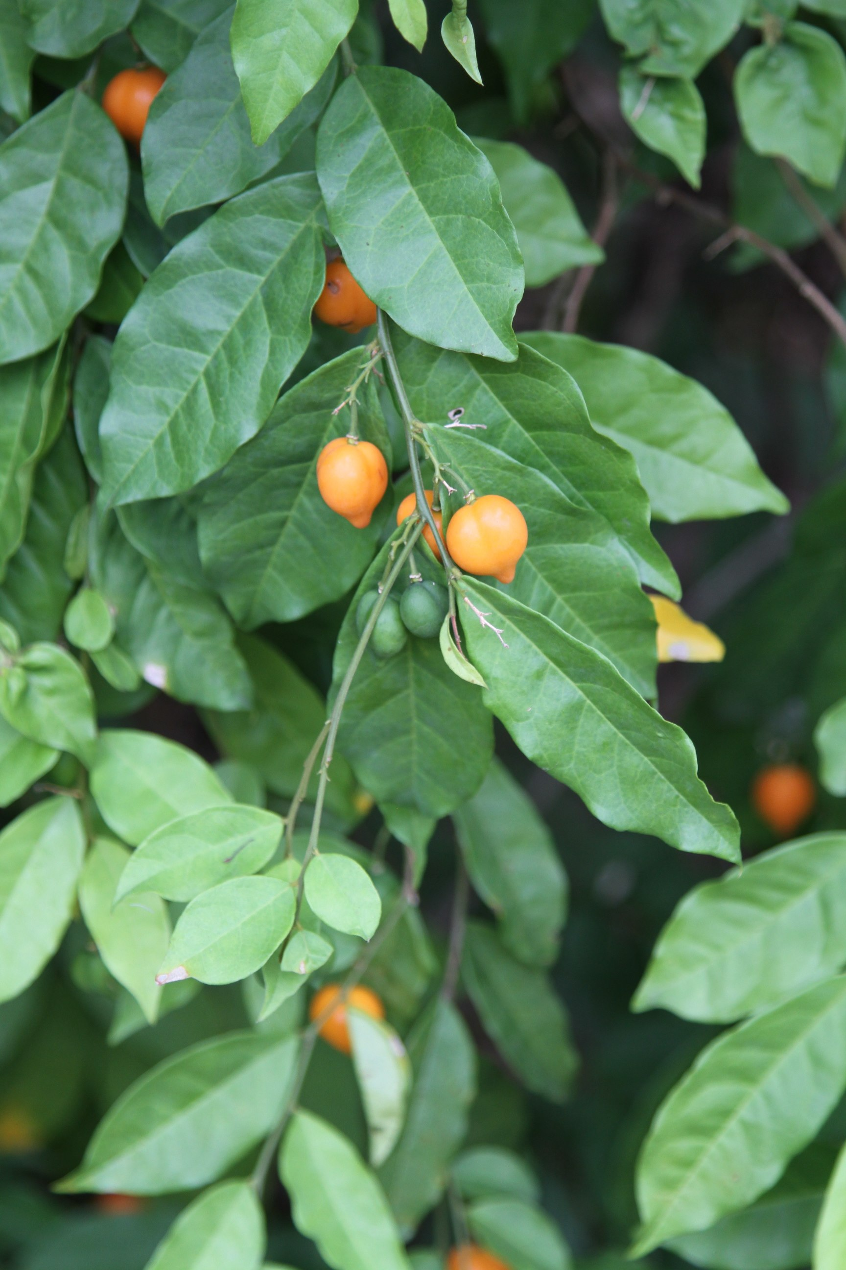 Monogaga